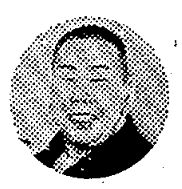 中野与之助